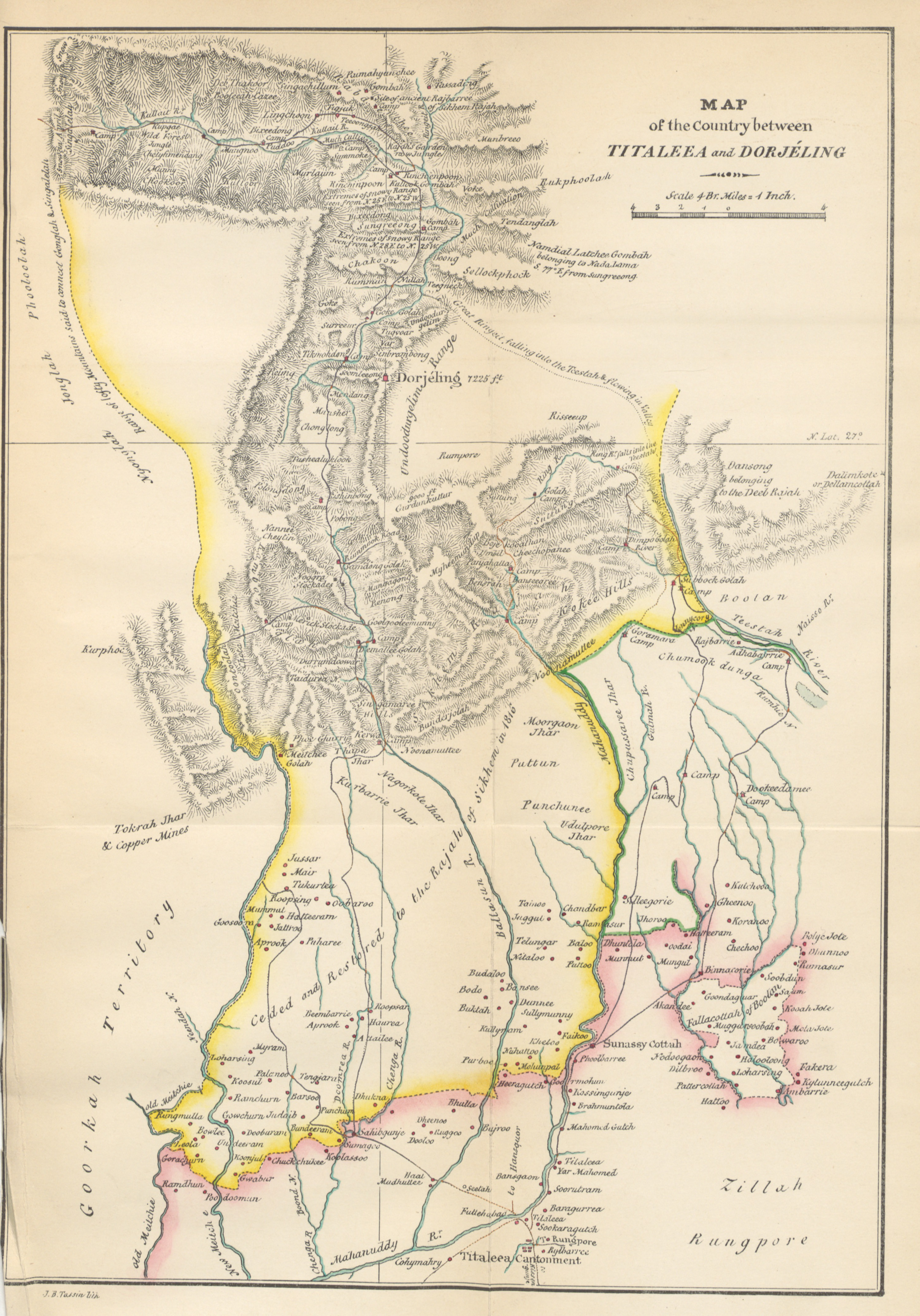 Map of Darjeeling (1838)